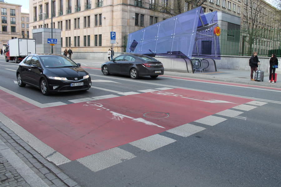 Śluza rowerowa na ul. Świętokrzyskiej po zachodniej stronie skrzyżowania z ul. Nowy Świat w Warszawie.